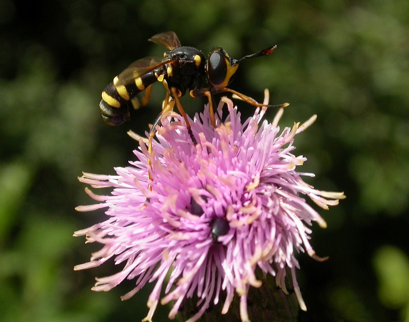 Unknown Conopidae - Dickkopffliege, Wutachschlucht, Schwarzwald, Deutschland